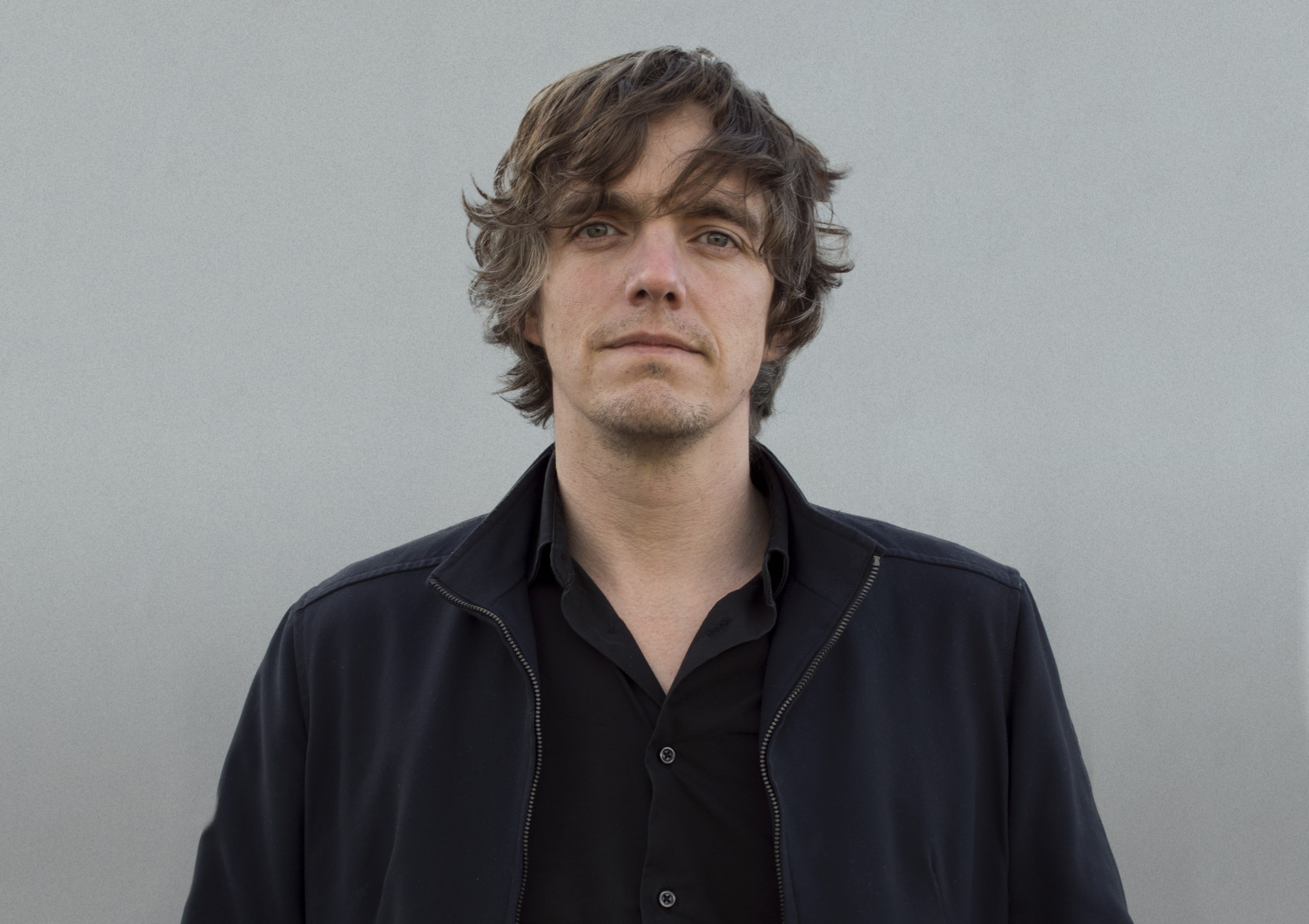 Portrait de Michel de Broin